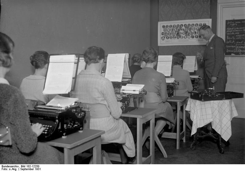 Die Eröffnung der grossen internationalen Büro-Ausstellung in den Ausstellungshallen am Kaiserdamm in Berlin! Eine Schreibmaschinen-Schule auf der Ausstellung. In dieser modernen Schule wird das Maschineschreiben nach Musik gelernt. Nach flotter Schlagermusik erlernt sich die Maschineschreiben bedeutend schneller. Information added by Wikimedia users.Schreibmaschine-Lernen mit Musikbegleitung, hier mit einem tragbaren Schellackplattenspieler; eine Innovation, die Friedrich Buhmann, Gründer der Dr. Buhmann Schule, 1931 auf der 7. Internationalen Büroausstellung IBA in Berlin (Ausstellungshallen am Kaiserdamm) offiziell präsentierte.